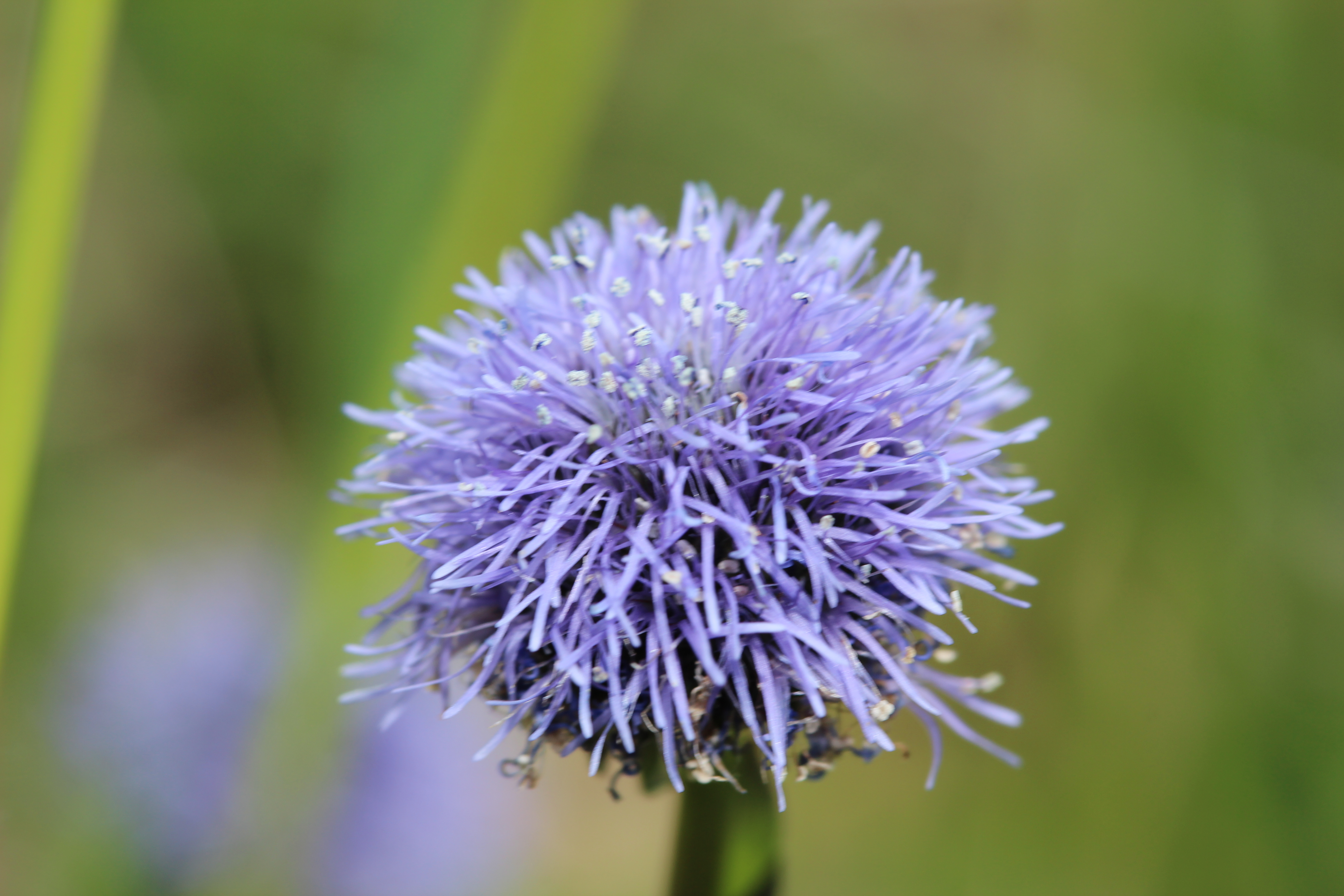 Globularia punctata